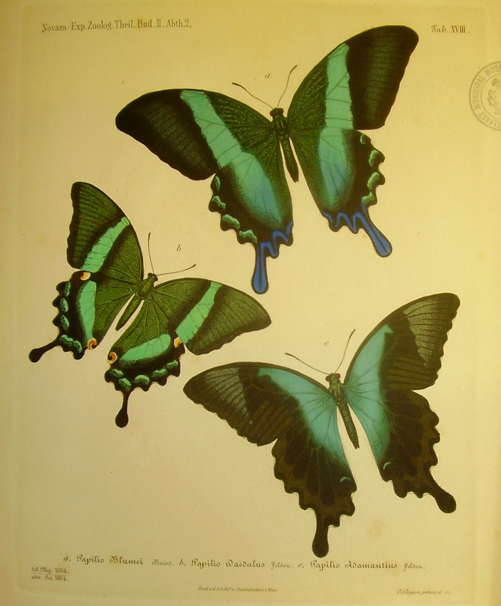 Plate from Reise Fregatte Novara.Zoologischer Theil, Lepidoptera. 1. Rhopalocera, Papilionidae